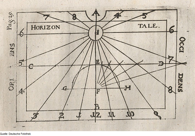 Original image description from the Deutsche Fotothek Astronomie & Gnomonik & Sonnenuhr